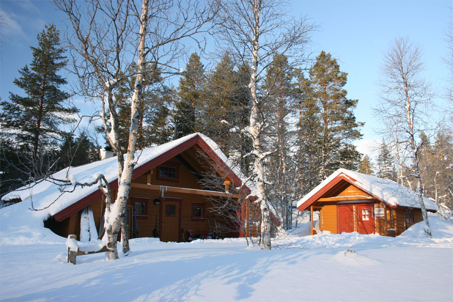 Vintersvøpt hytte på Mjølfjell